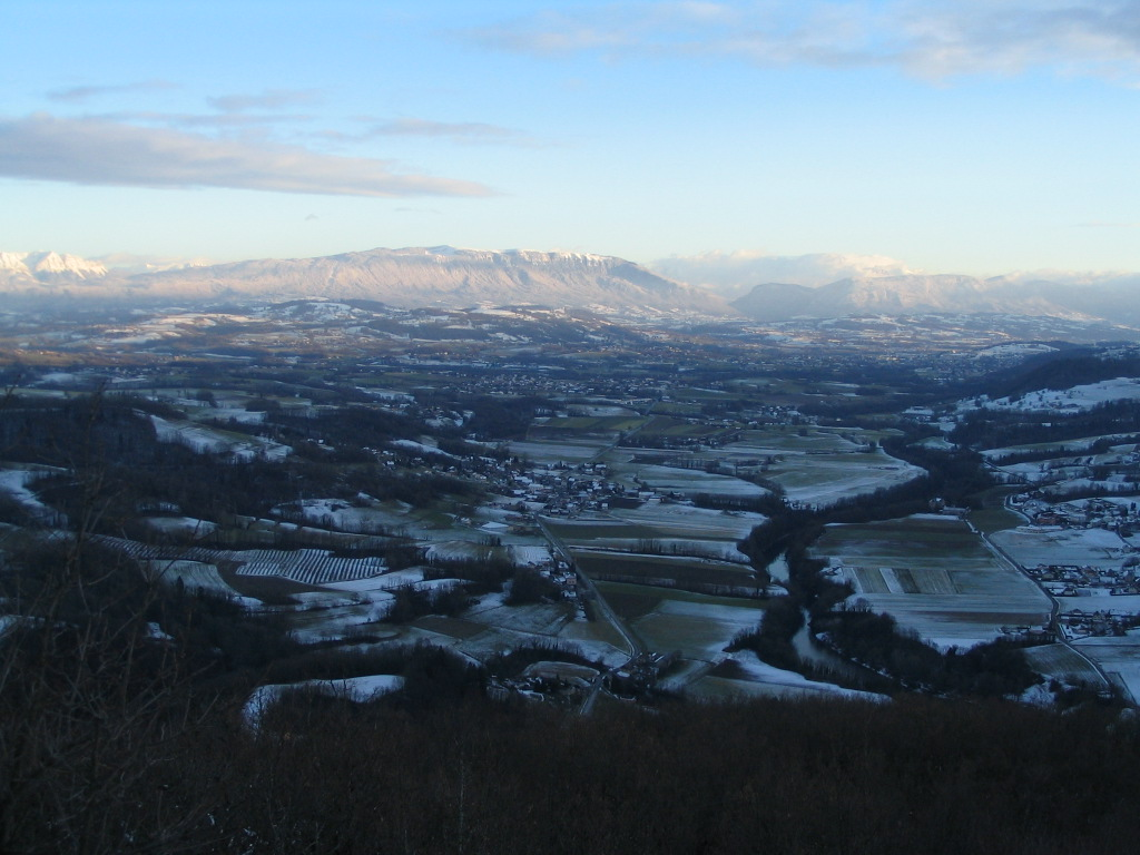 Author : B-root Plaine de l'Albanais (Haute-Savoie) et vallée du Fier vues de la montagne des Princes, objectif en direction du Sud-Sud-Est. Au fond : le Semnoz et les Bauges.